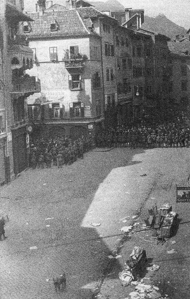 Hilfloses Italienisches Militär beim Abriegeln der Menschenmenge nach dem faschistischen Blutbad am 24. April 1922 auf dem Bozner Obstmarkt